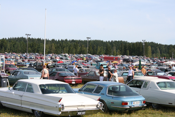 Picknick 2007, Forssa, Finland